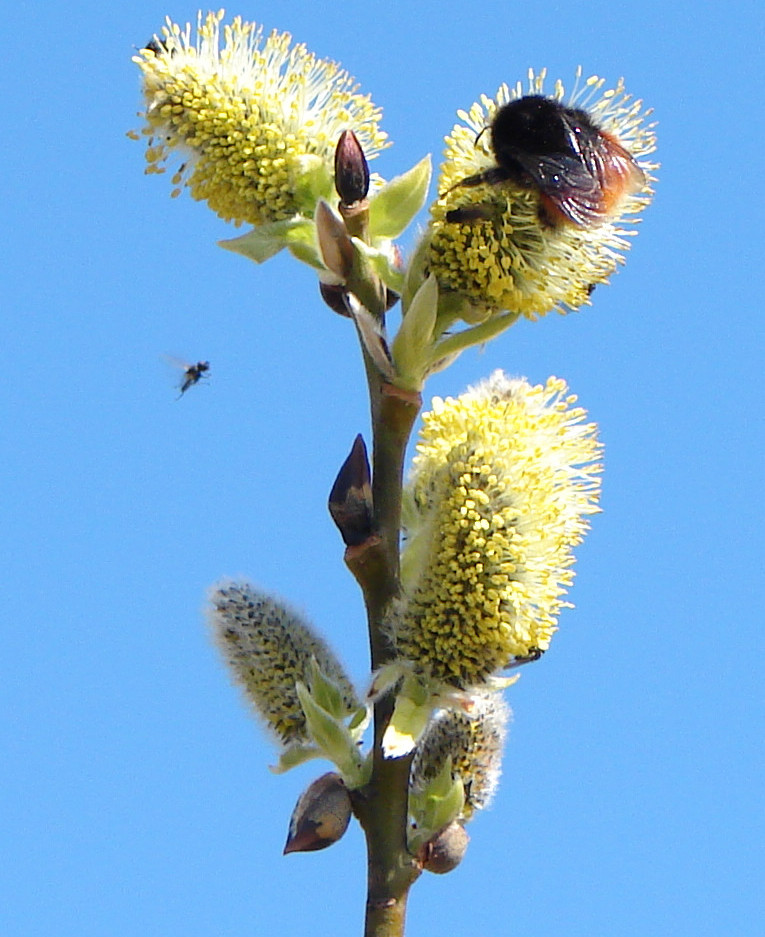 Bombus monticola queen on Salix caprea male Norwegian: Hannselje, blomstene kalles gåsunger.